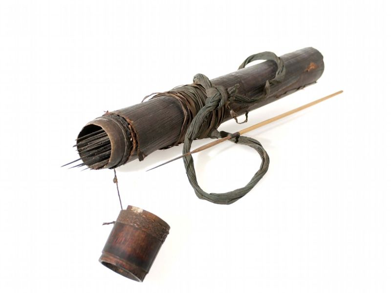 Pijlkoker. Bamboe pijlenkoker met 37 pijlen, 2 pijlpunten en 6 palmbladnerven, met deksel en hoes